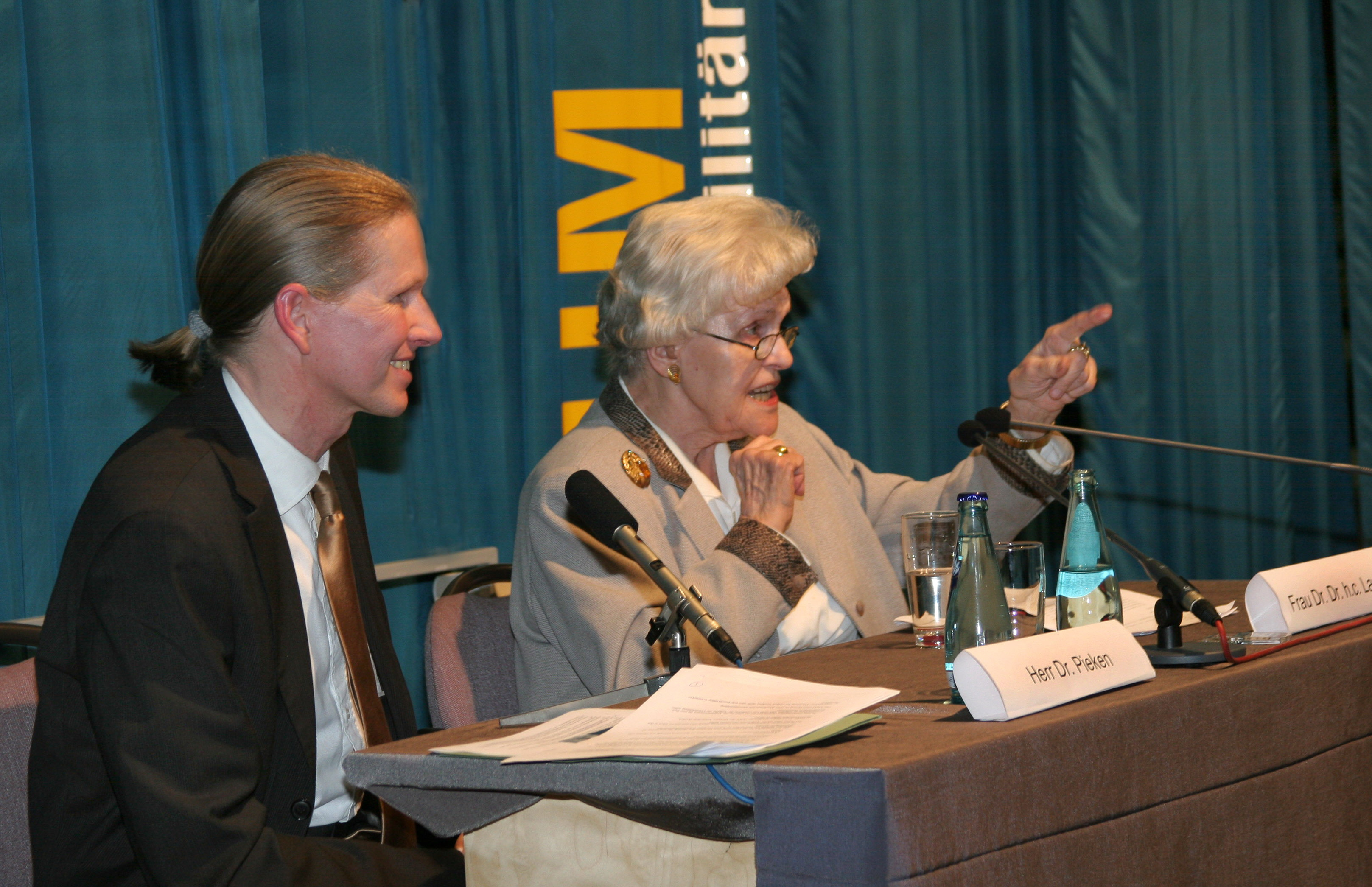 Dr. Gorch Pieken und Dr. Hanna Renate Laurien (2009)